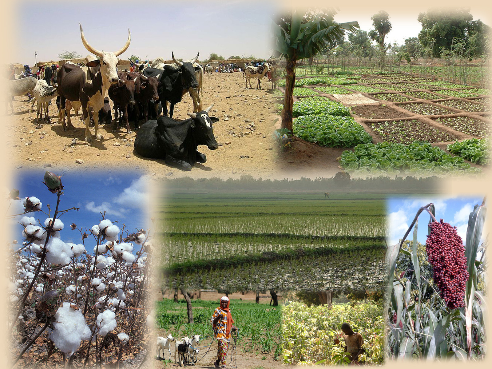 Différentes productions agricoles du Burkina Faso. Image composée à partir d'images récupérées sur Commons